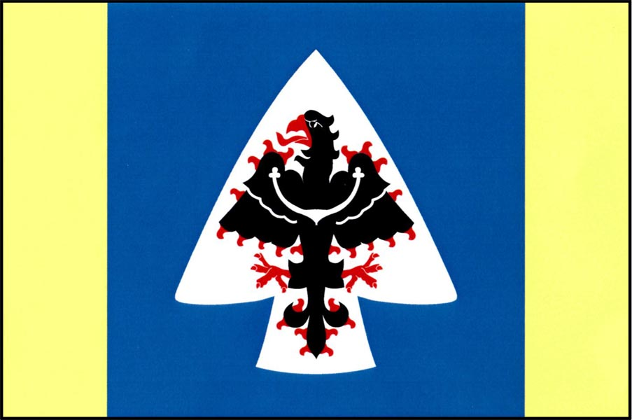 Vlajka obce Hybrálec